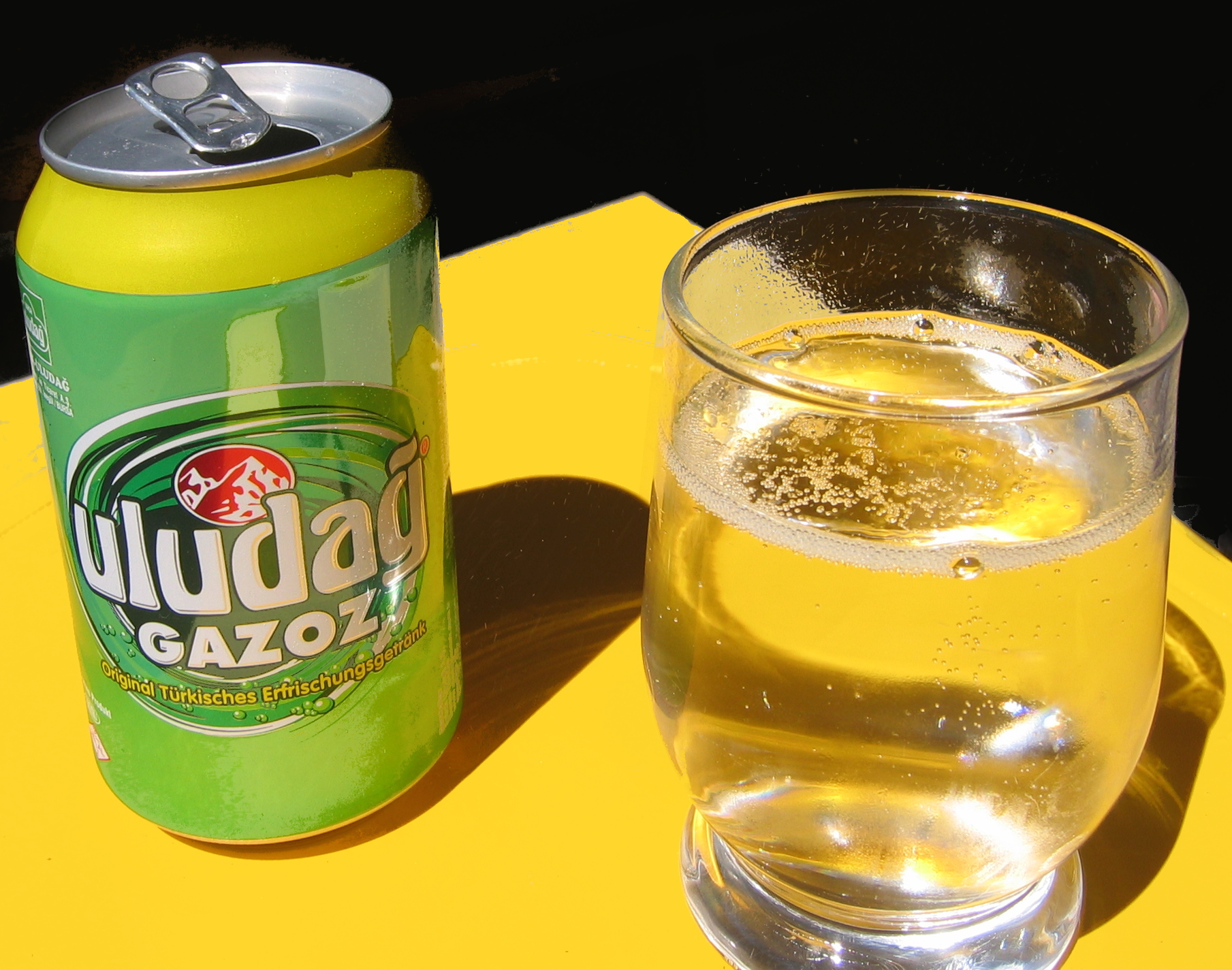 Uludağ GAZOZ im Glas